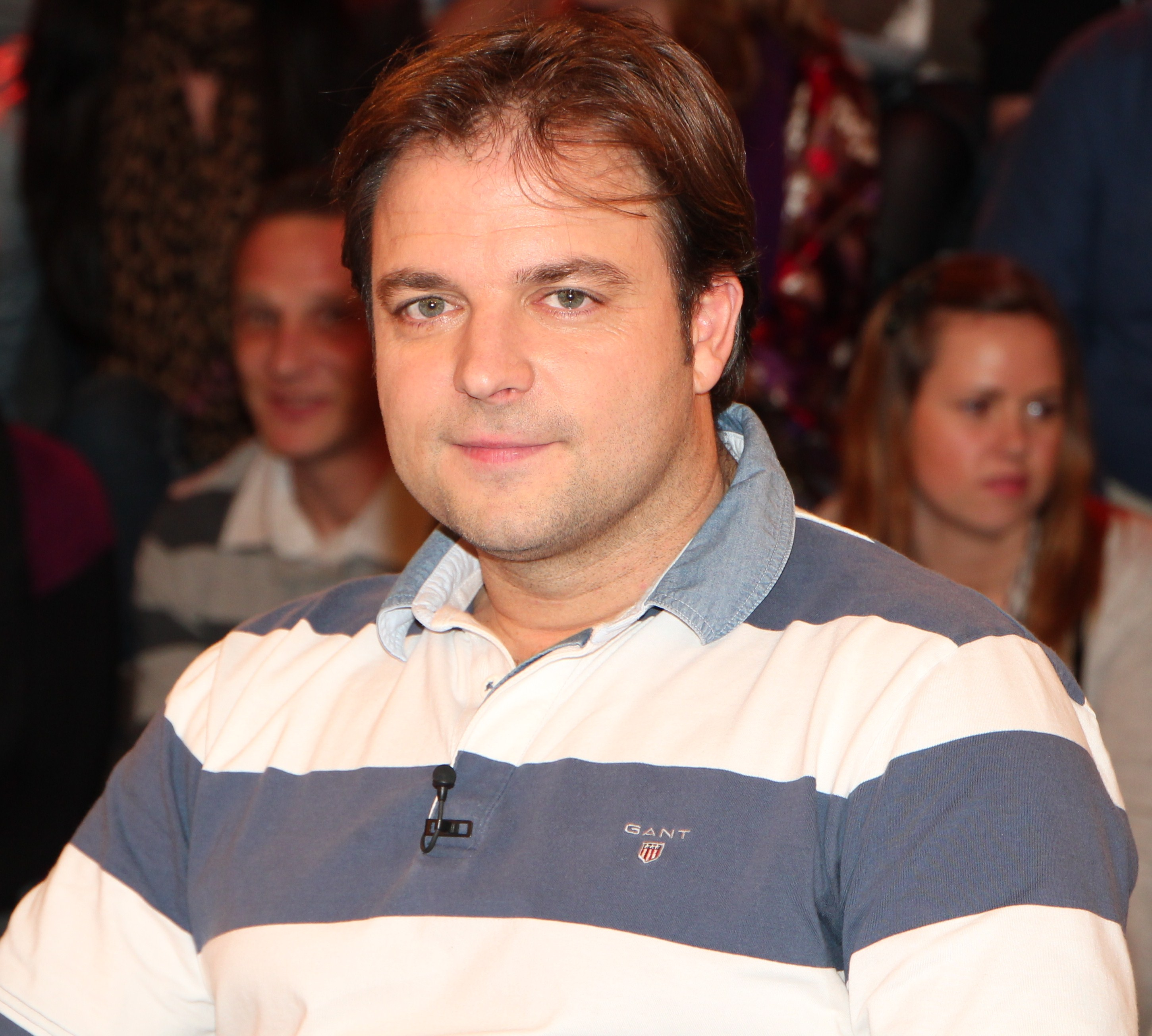 Martin Rütter Hundetrainer , Comedian